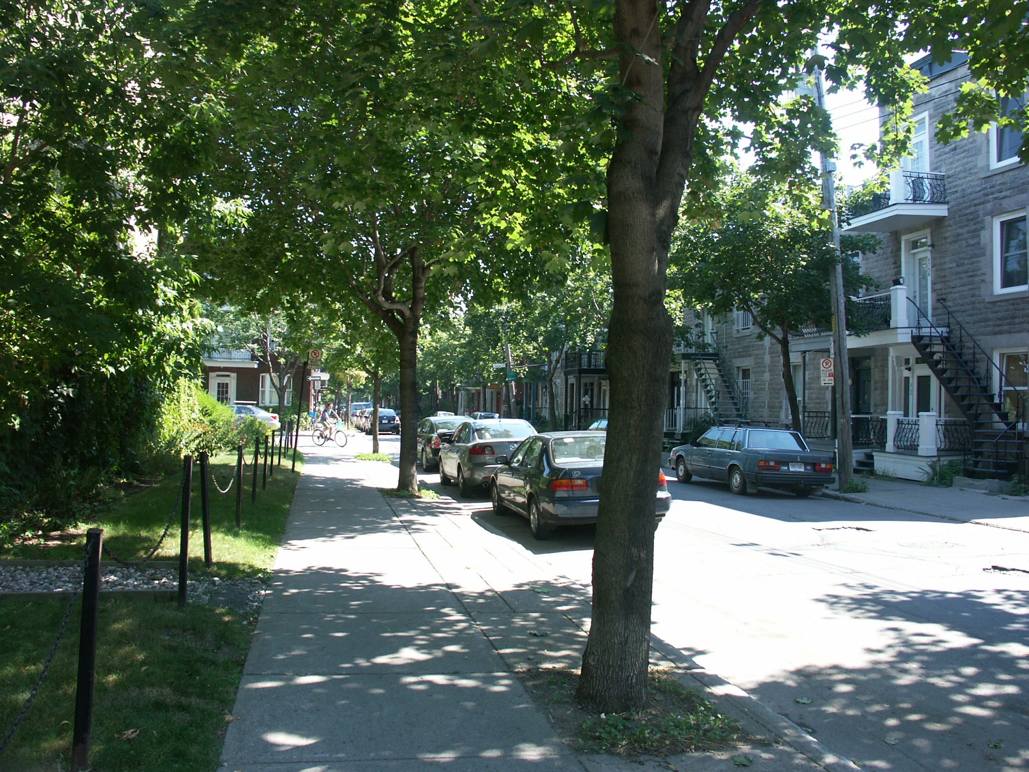 Rue résidentielle typique du plateau Mont-Royal, près du parc Laurier, à Montréal